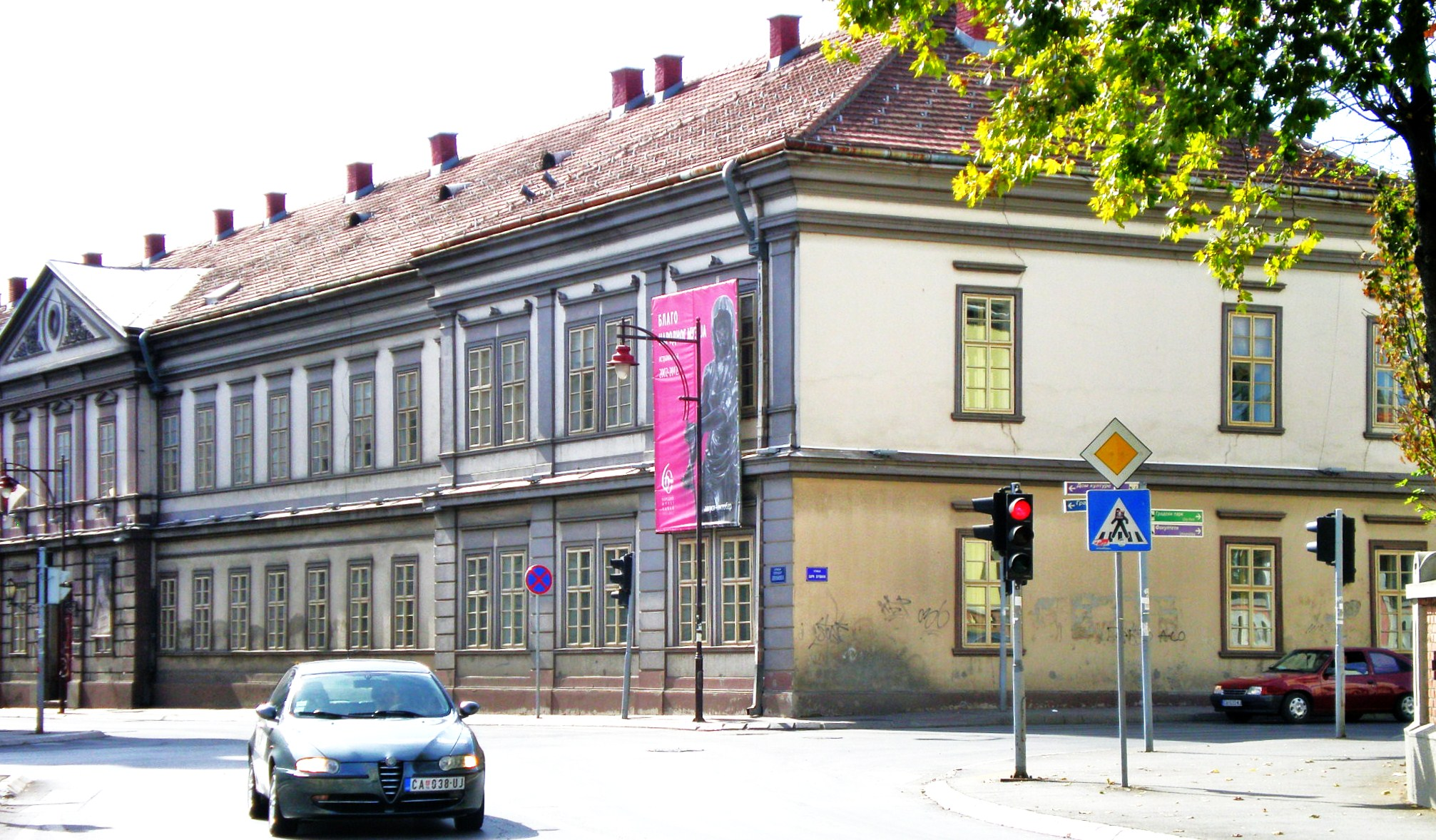 У згради некадашњег Окружног начелства у Чачку данас је смештен Међуопштински историјски архив за моравички округ.